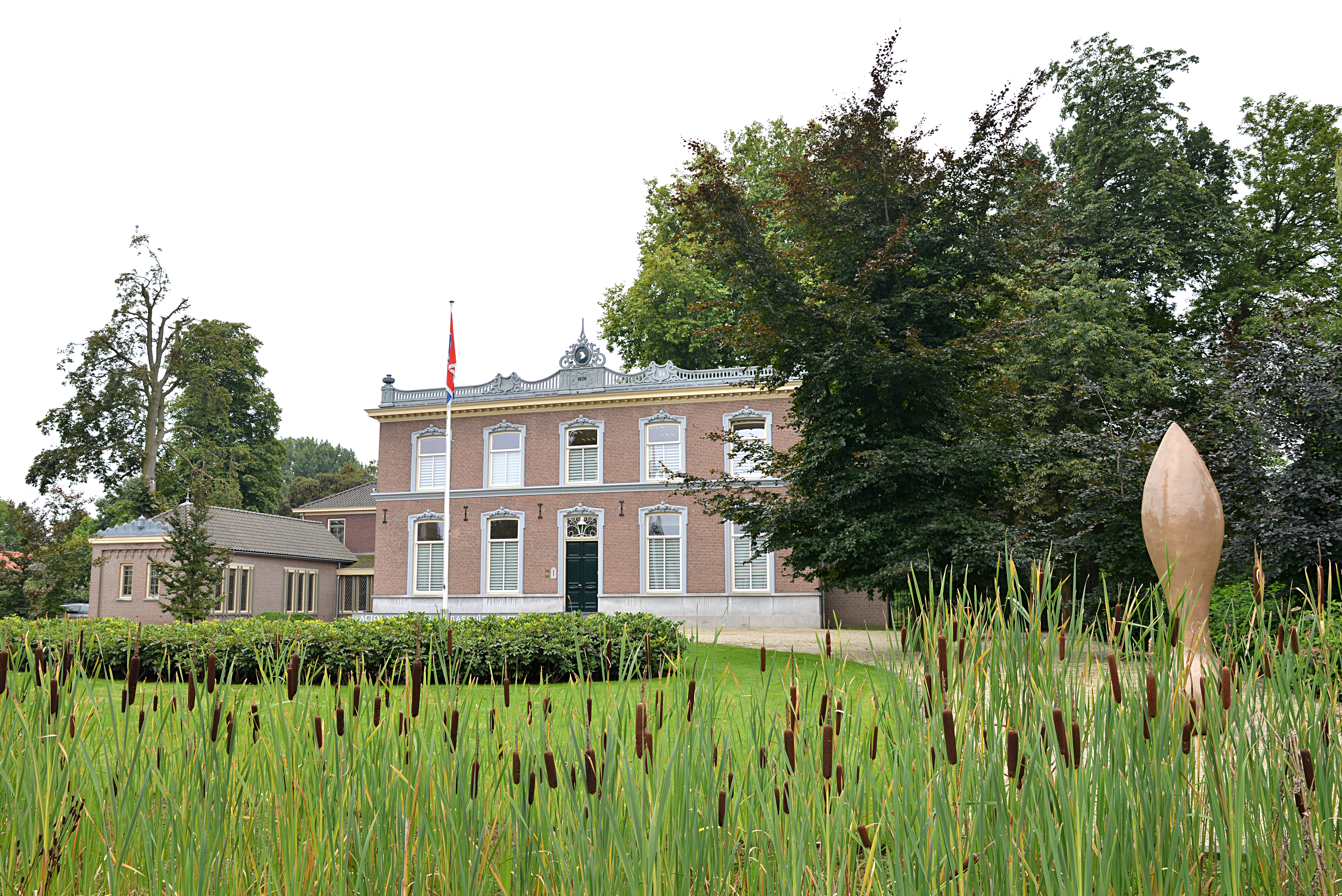 Voormalig hoofdkwartier van het 501st Parachute Infantry Regiment (101st Airborne Division) 'Villa Klondike', voor de Tweede Wereldoorlog bekend als 'Huize Rustplaats'.